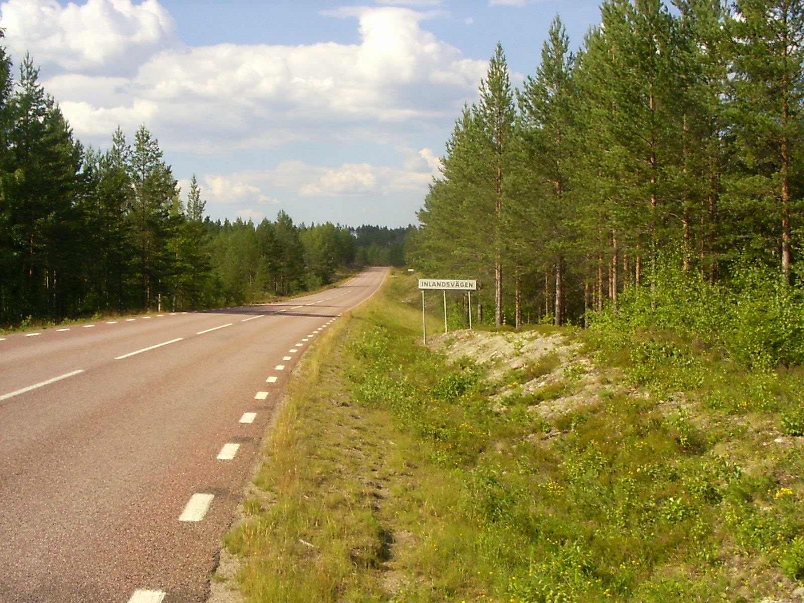 Rijksweg 26 tussen Vansbro en Siknäs kerk met bord Inlandsvägen